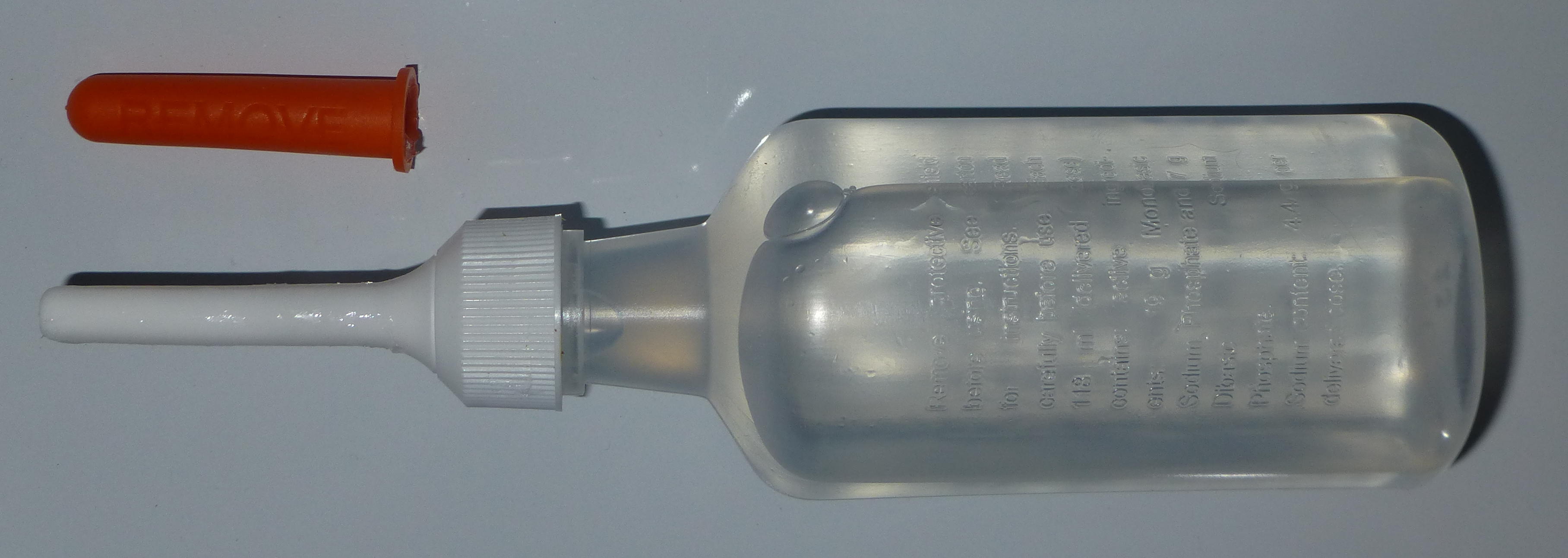 A prepared, disposable enema.